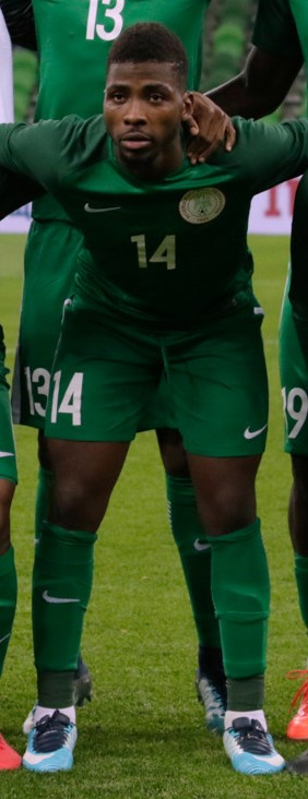 Nigeria national football team